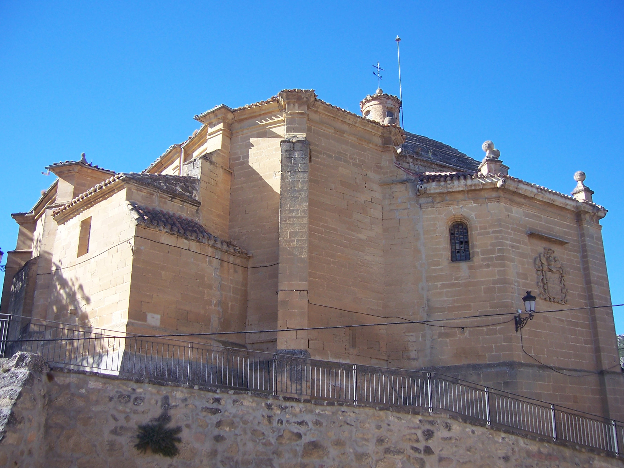 Iglesia Parroquial de San Pelayo Mártir en Villalba de Rioja - La Rioja